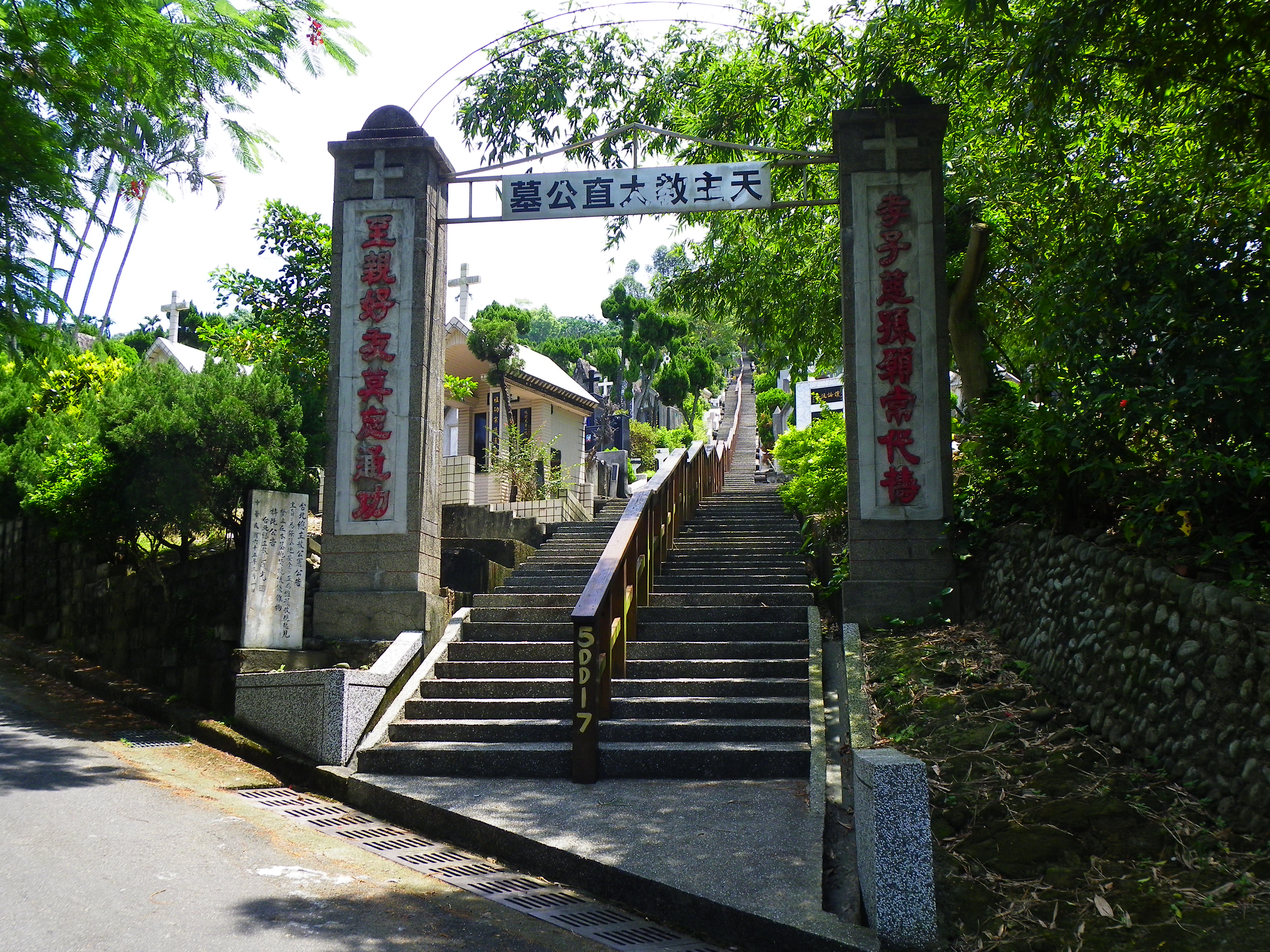 天主教大直公墓入口，地址：臺北市中山區通北街145巷3弄5號 。